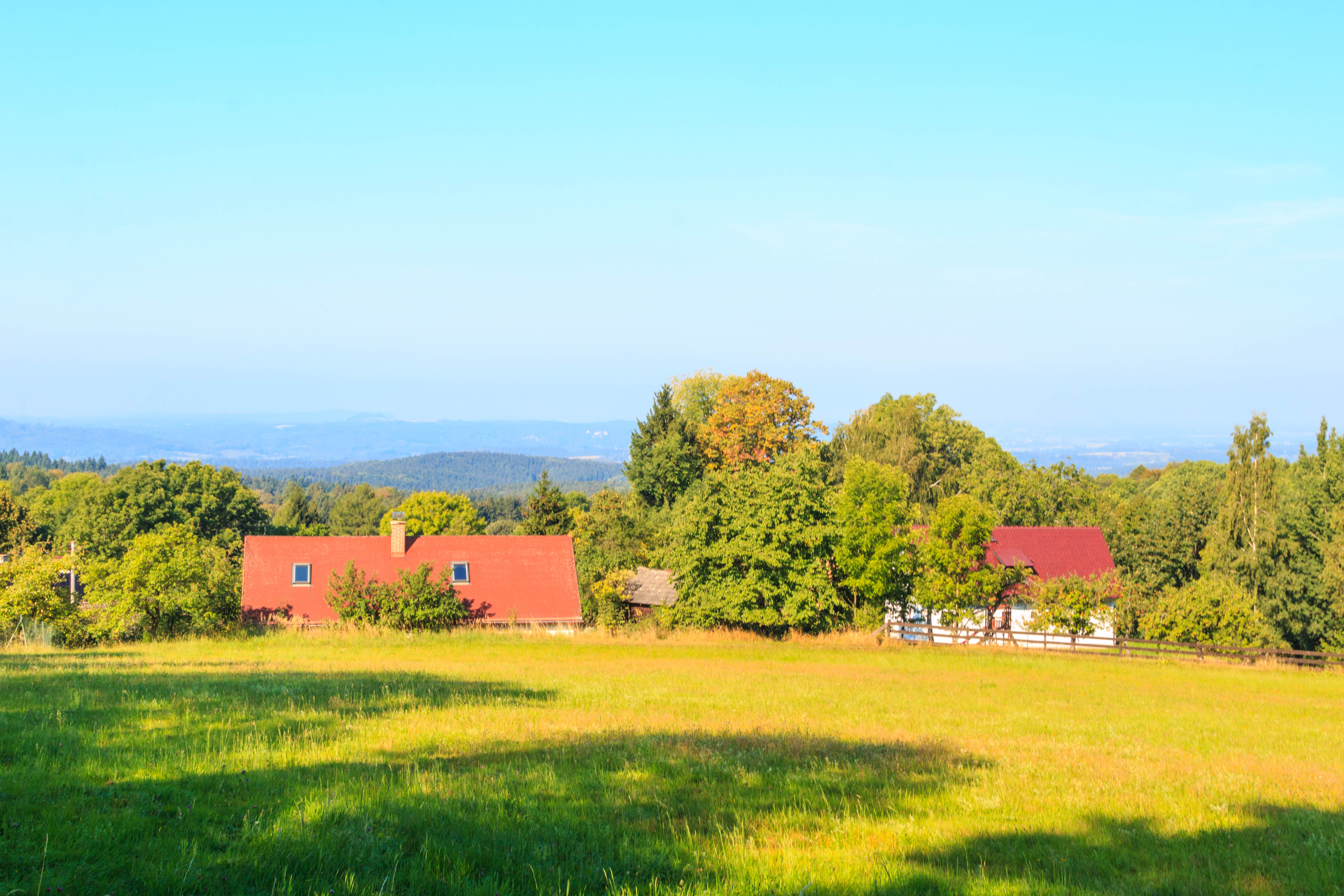 Černá u Lomnice nad Popelkou - čp. 9